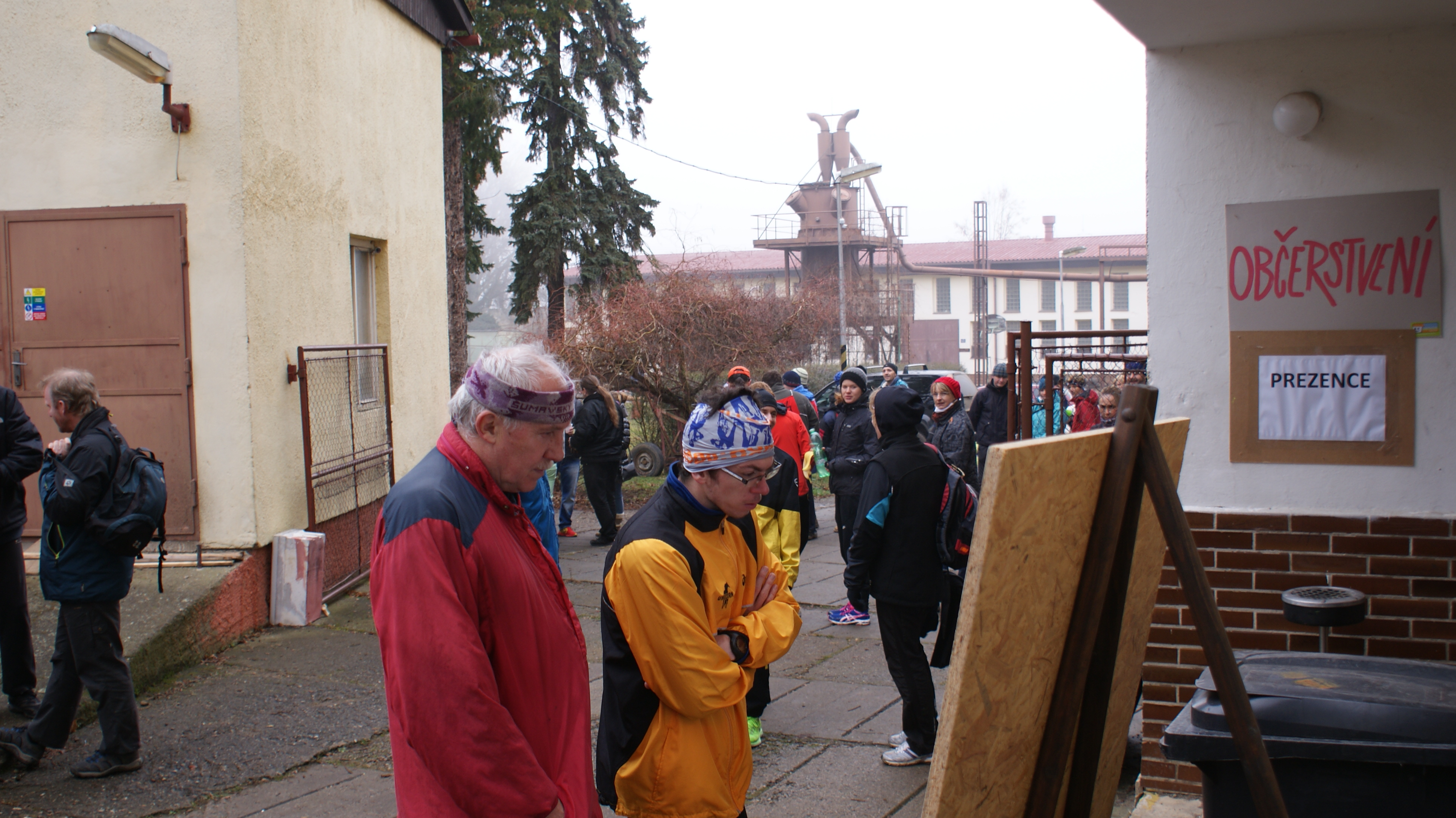 Zimní běh Litní - studium propozic 18. 1. 2014